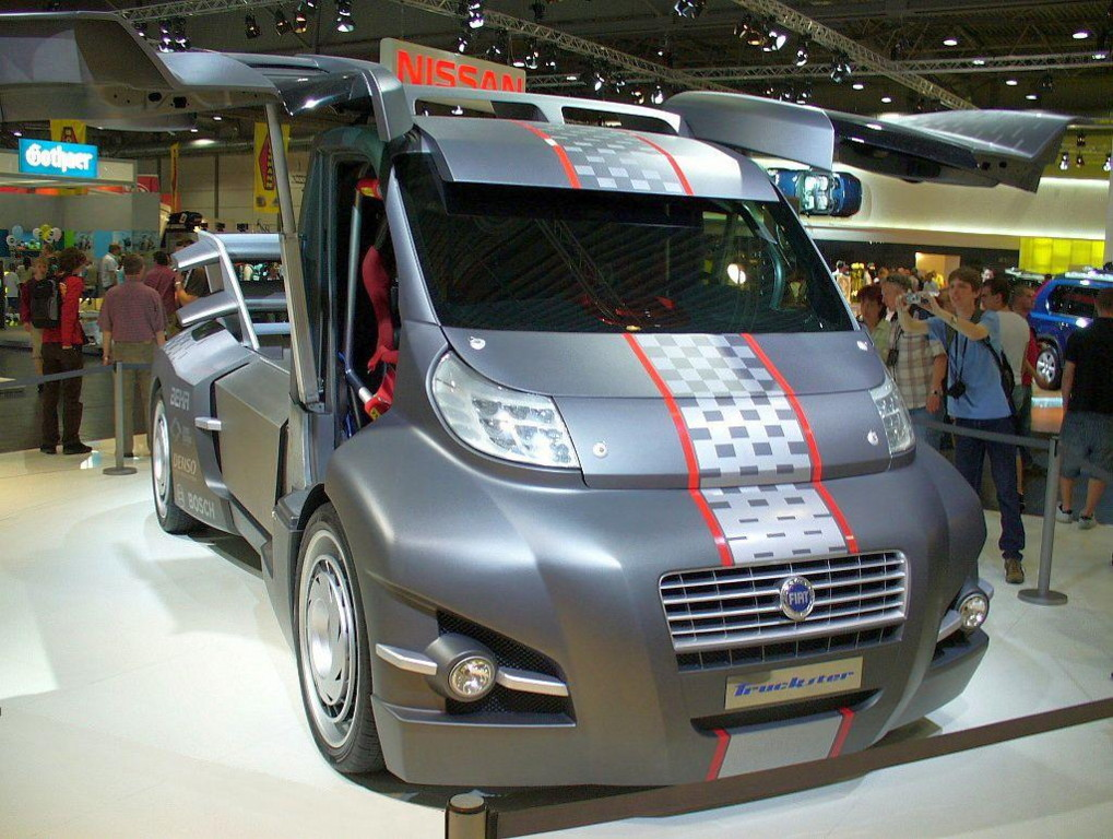 Fiat Truckster